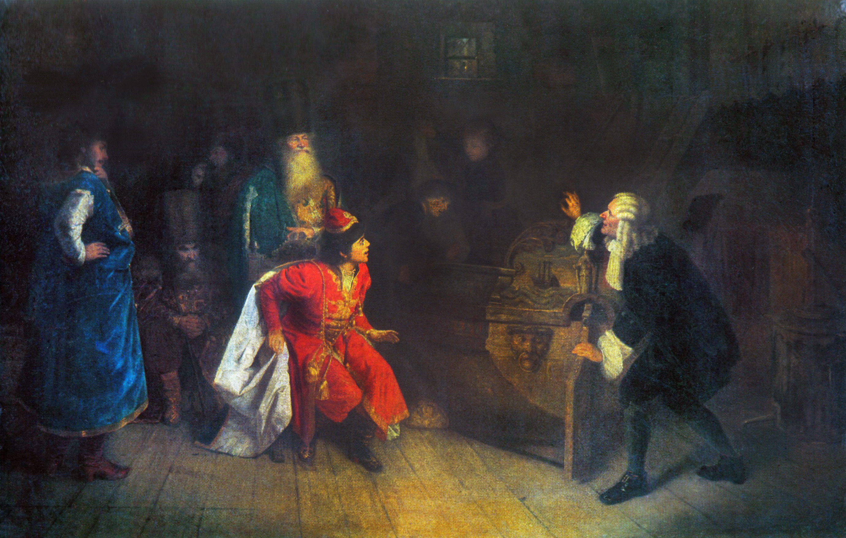 Картина Григория Мясоедова «Дедушка русского флота». Франц Тимерман объясняет Петру Алексеевичу устройство ботика, найденного в одном из амбаров села Измайлово